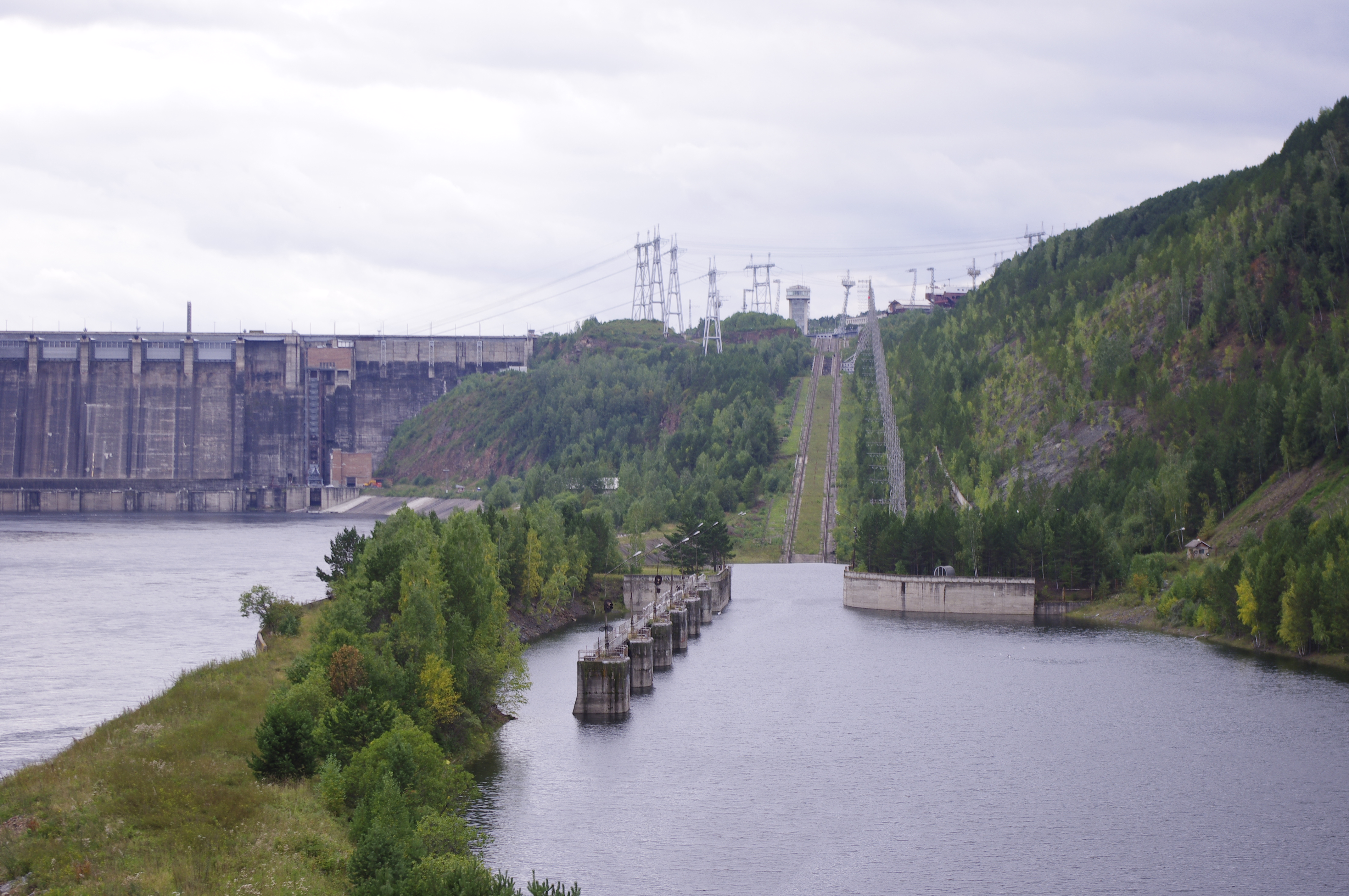 Lato 2013.